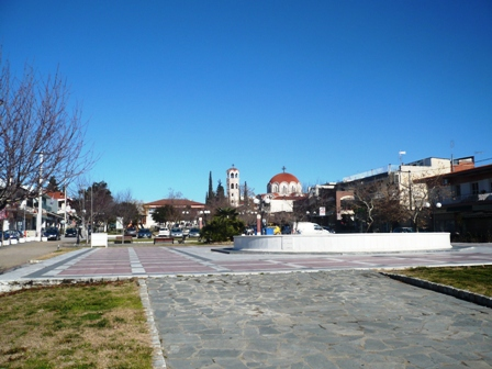 Ο Αγιος Αθανάσιος